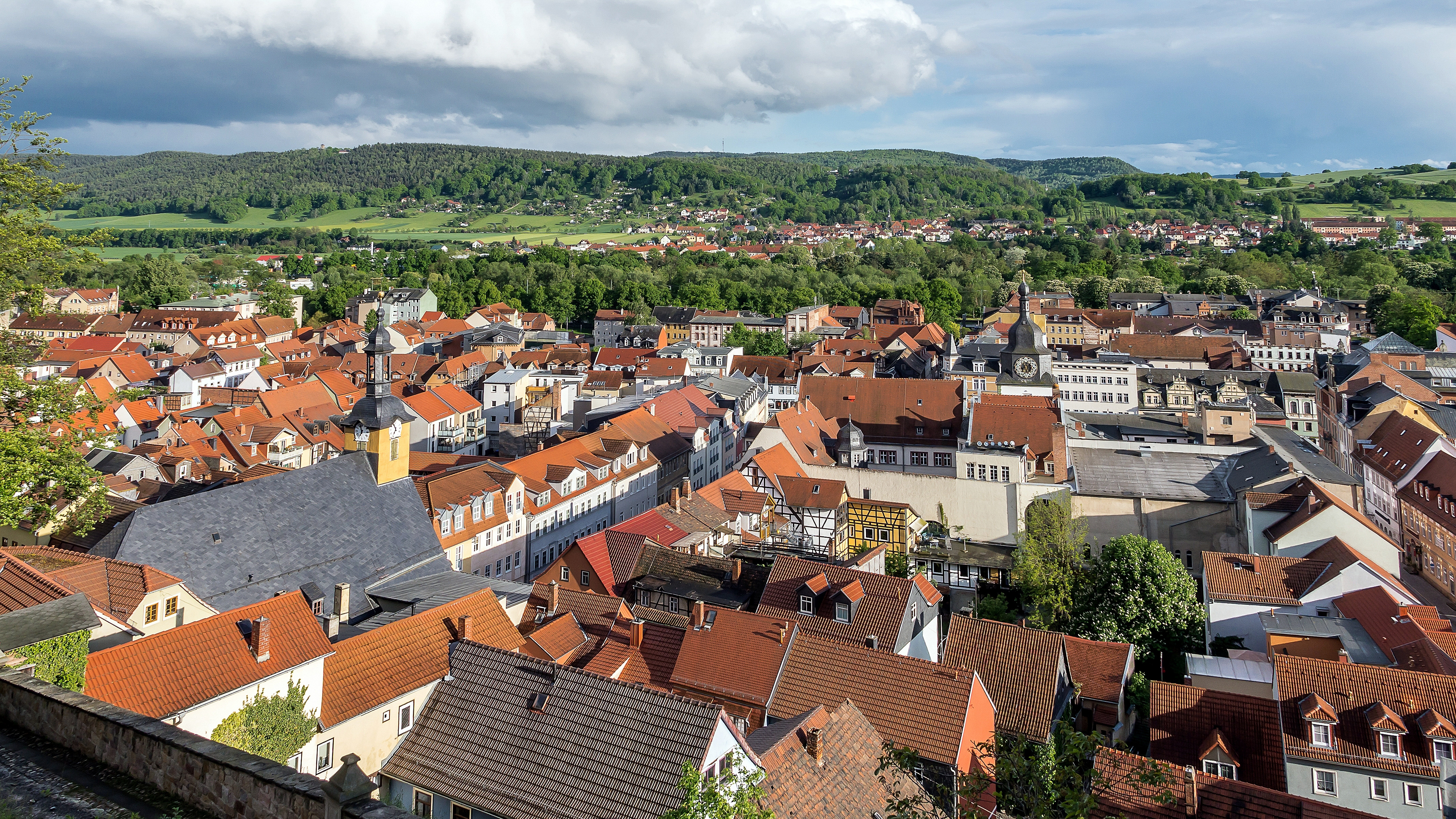 Rudolstadt Kernstadt Denkmalensemble „Kernstadt Rudolstadt“